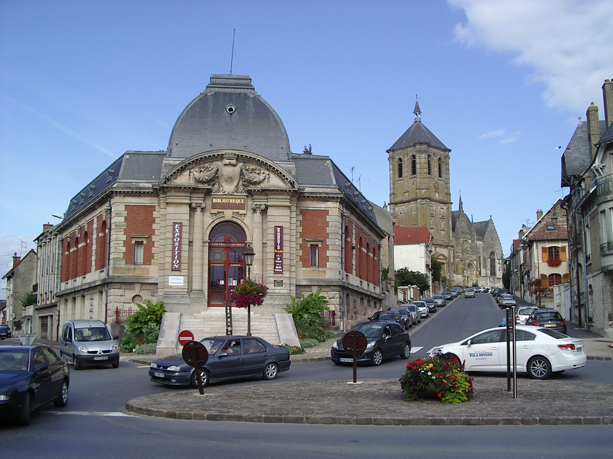 En avant la Bibliothèque et en arrière plan l' église saint-Nicolas, Rethel, Ardennes , France